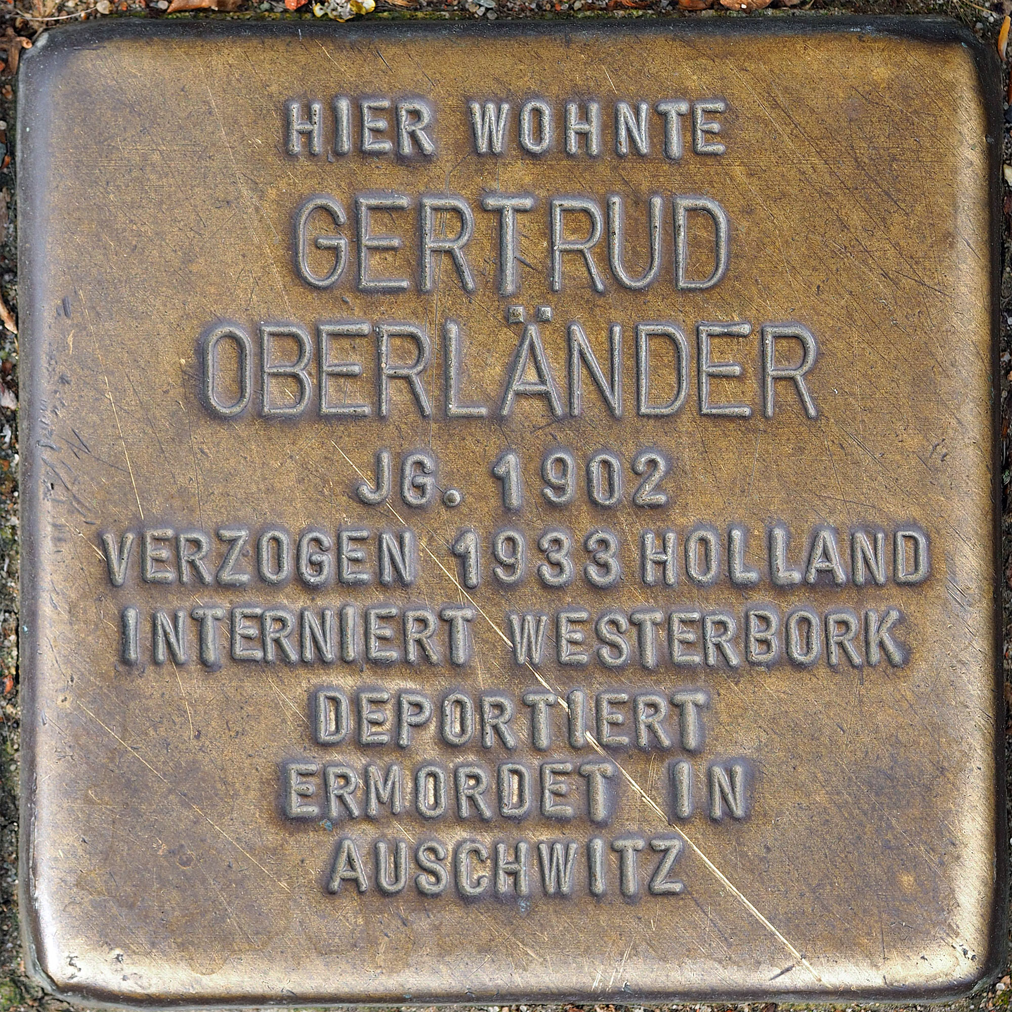 Stolpersteine MG: Oberländer, Gertrud